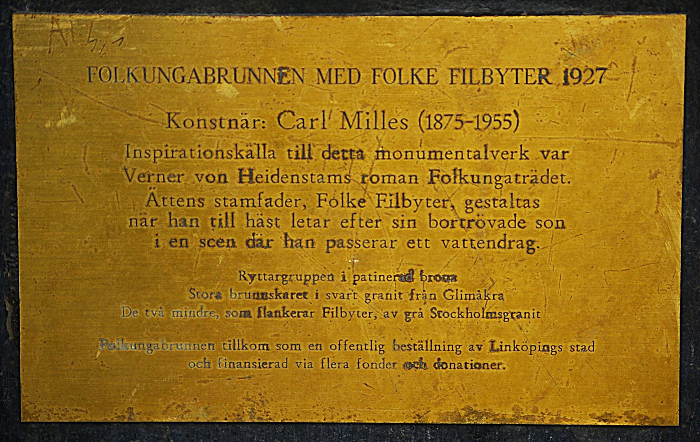 Mässingsskylt på Folkungabrunnen, staty av Carl Milles på Stora Torget i Linköping.